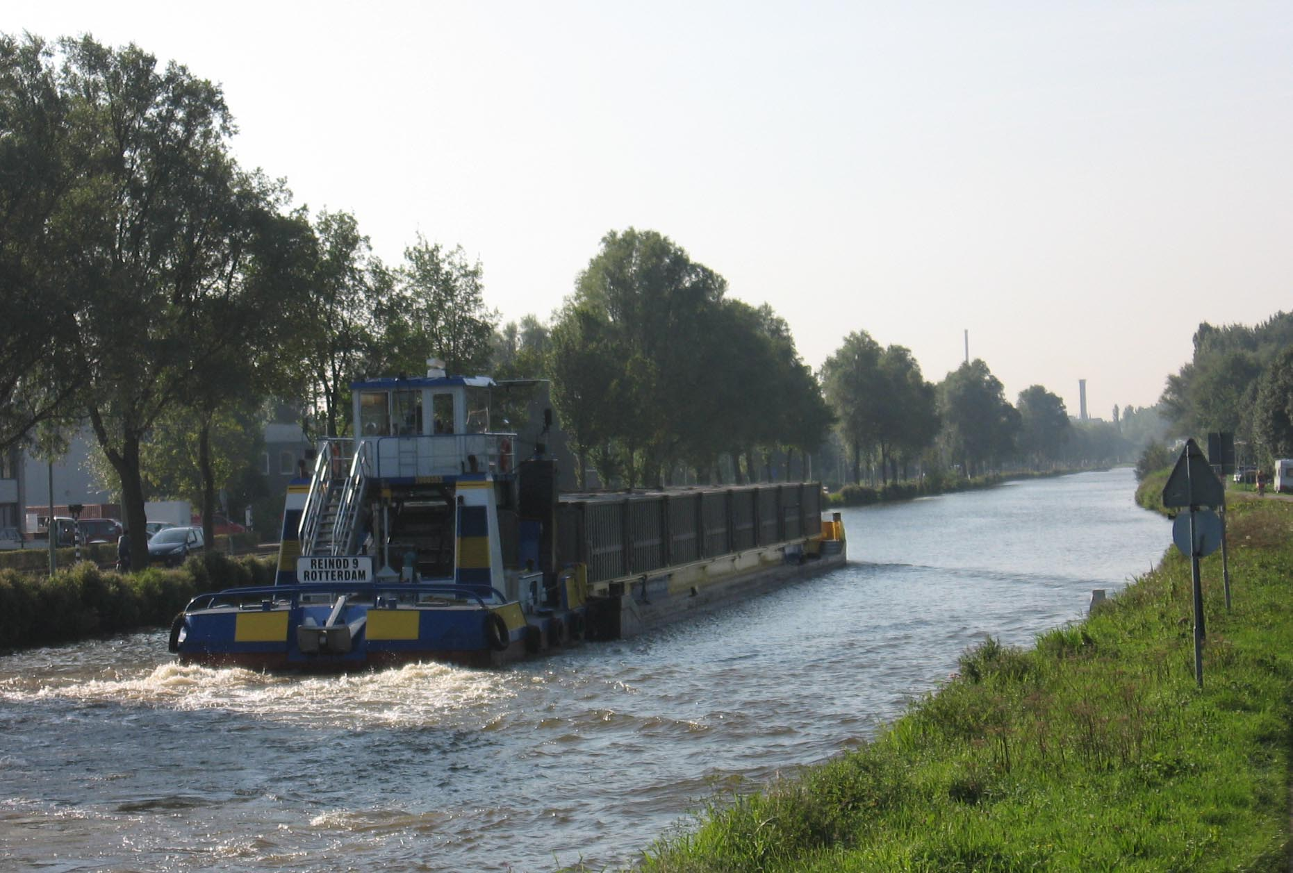 Binnenvaartschip op het Rijn-Schiekanaal bij Rijswijk (Vliet), sept. 2006